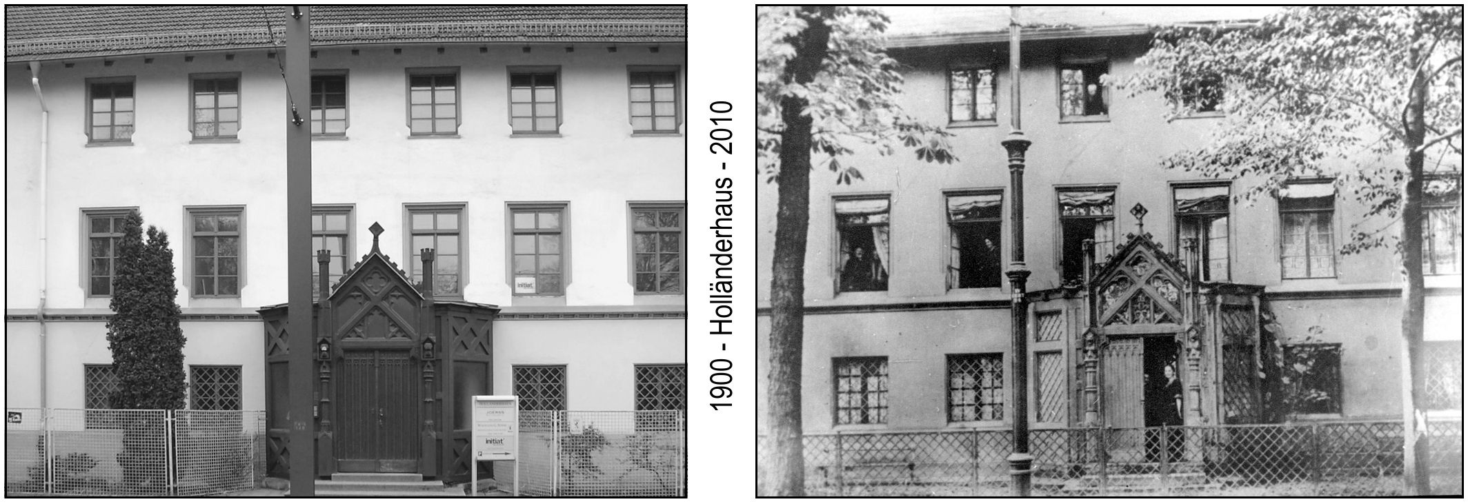 Holländerhasu - Eingang - im Vergleich 1900 und 2010